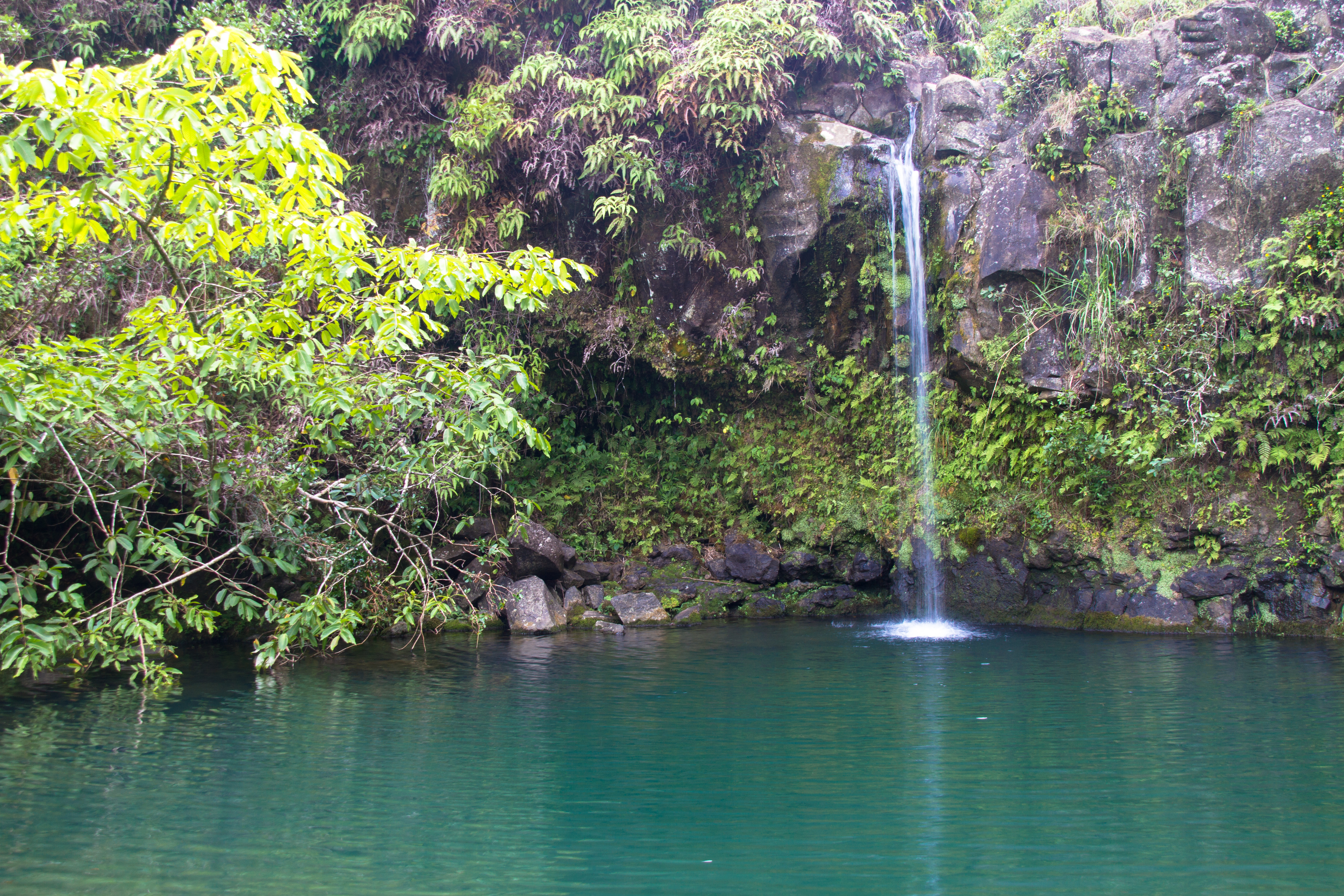 Pua'a Ka'a Falls